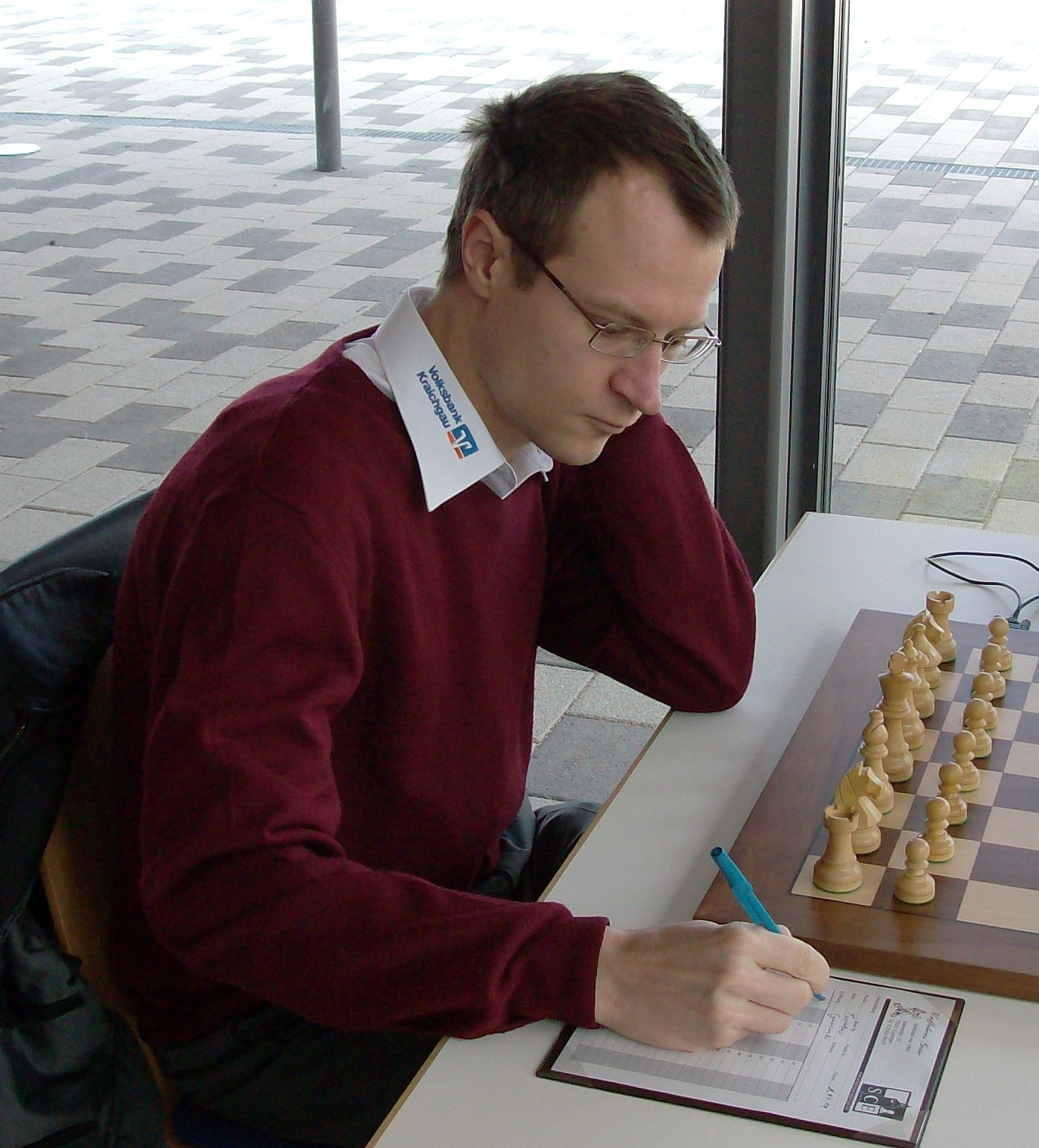 Sergei Tiviakov, chess grandmaster